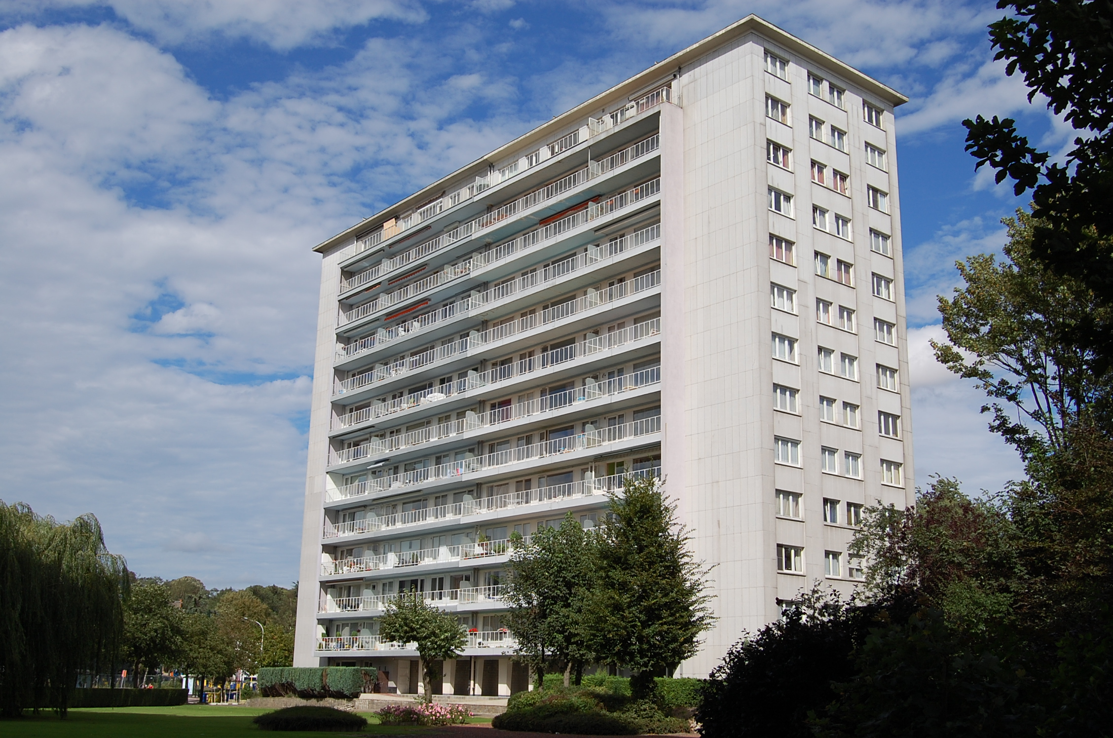 Immeuble Etrimo 1070 Bruxelles